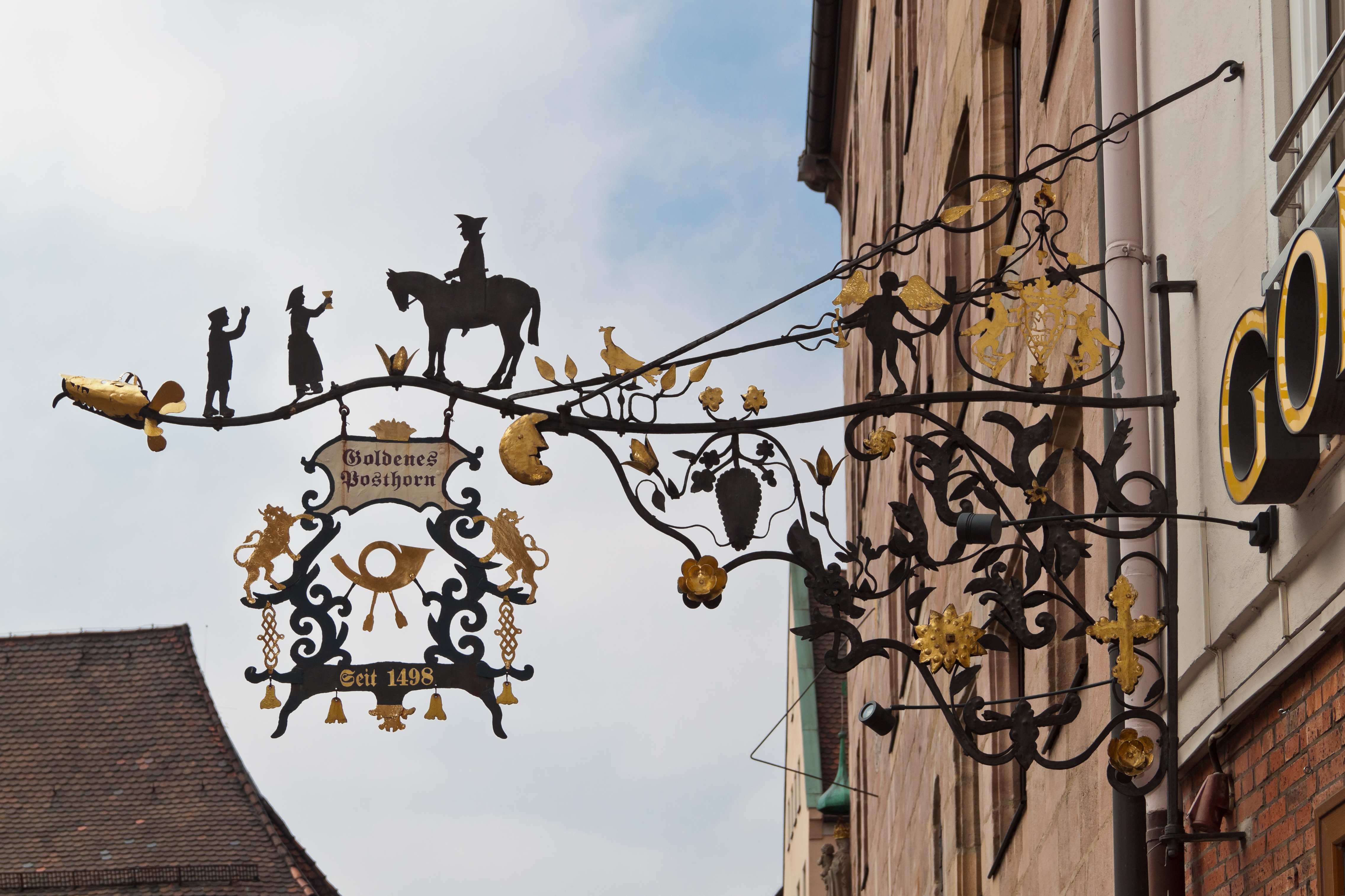 Restaurant "Goldenes Posthorn" in Nürnberg